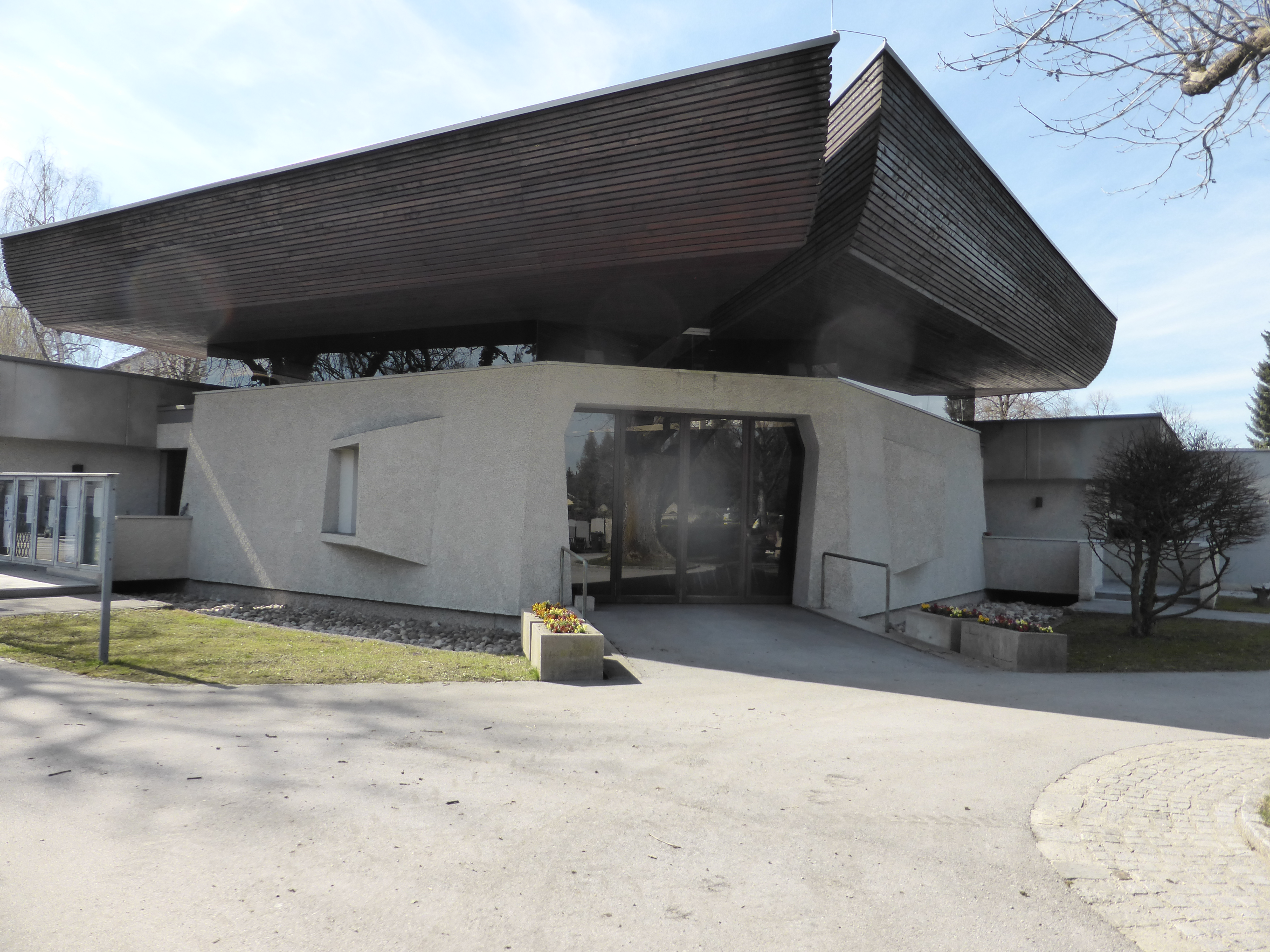 Kath. Pfarrkirche Maxglan, Aussegnungshalle